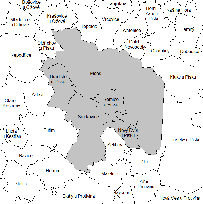 Katastrální mapa Písku a okolí